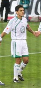 Josué